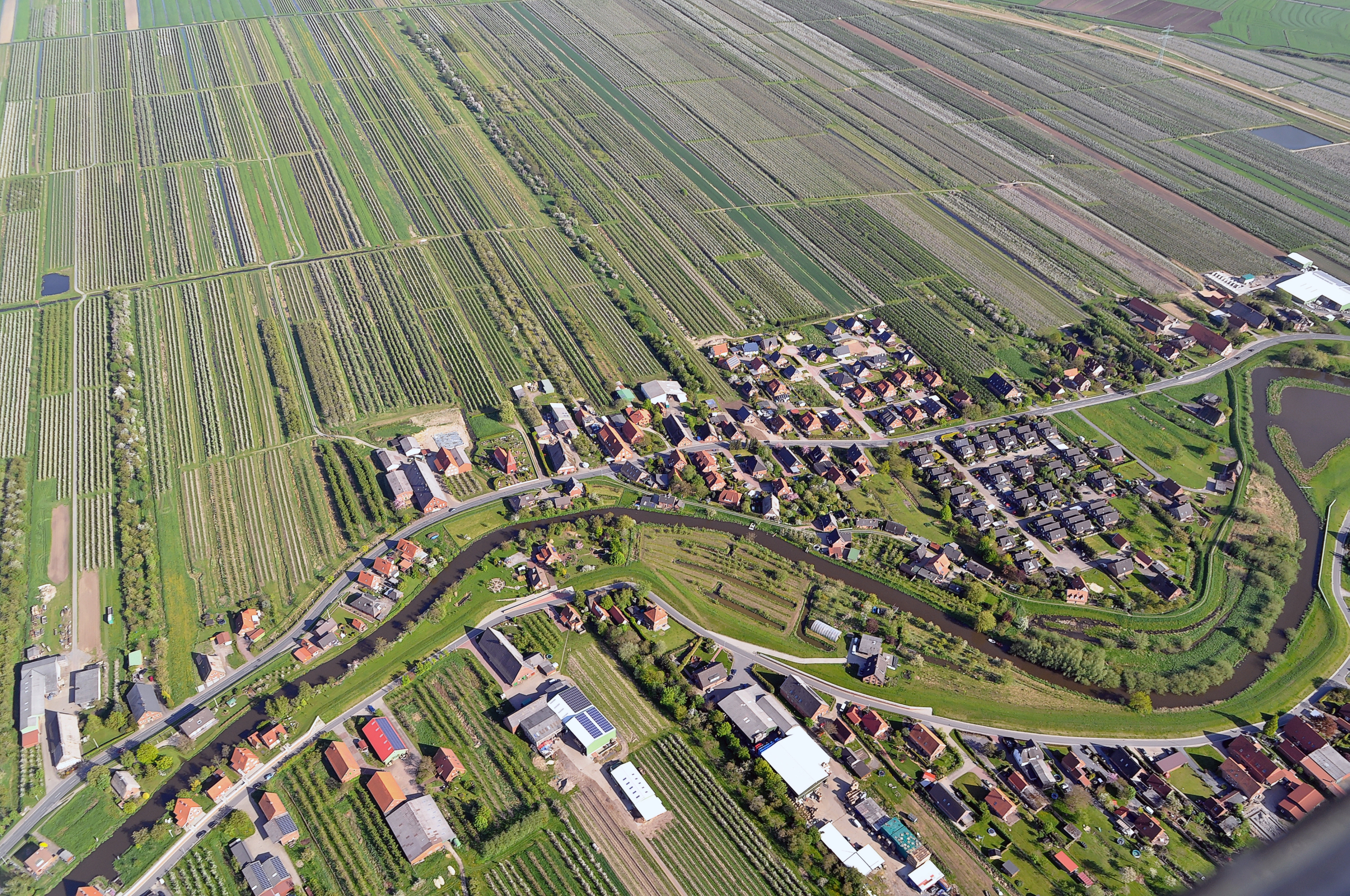 Luftbilder von der Nordseeküste 2012-05